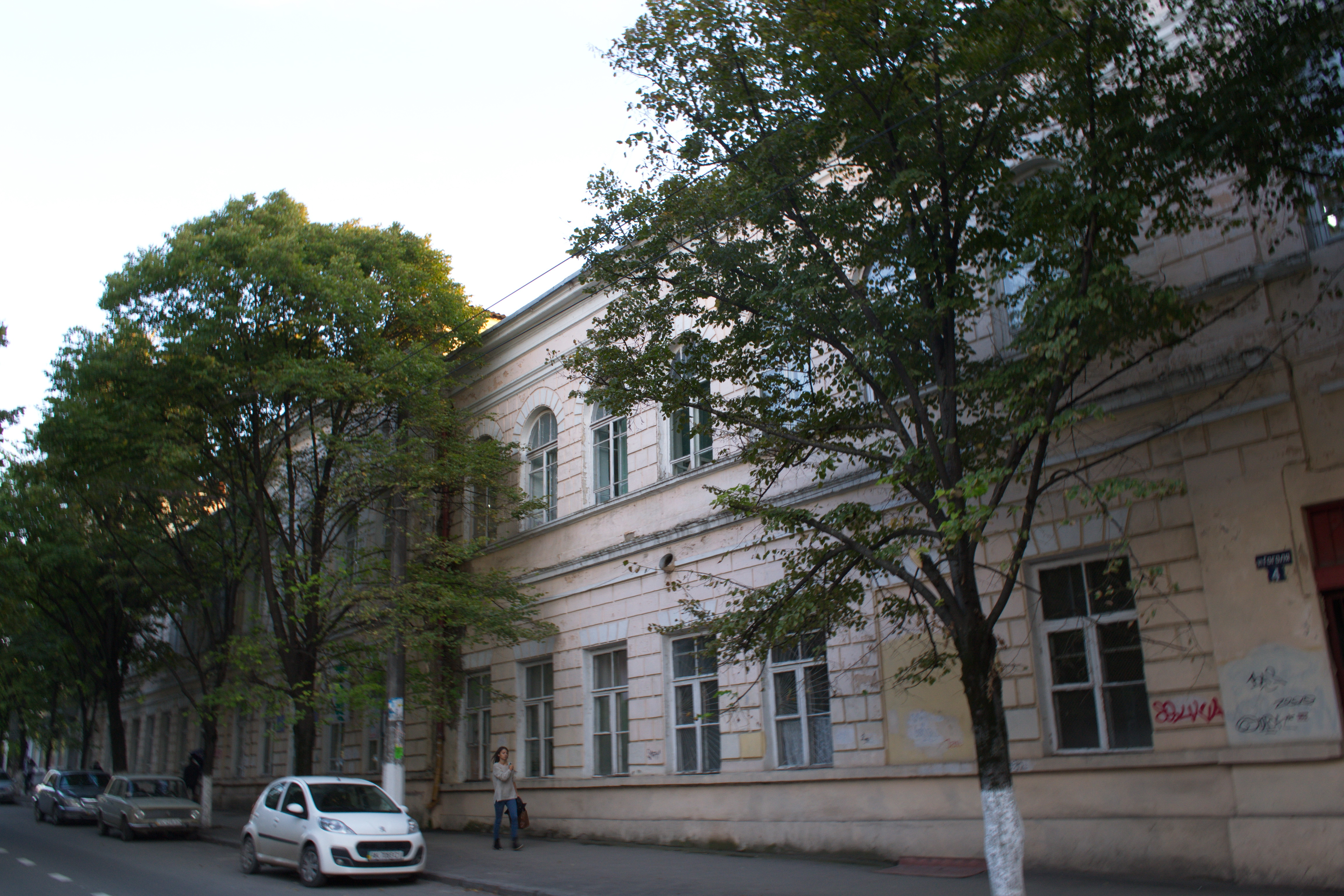 Будівля готелю «Північний», Сімферополь, вул. Гоголя, 4, літер «А», «Б»